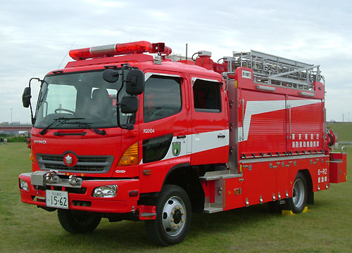 東京消防庁第６消防方面本部消防救助機動部隊6本部機動2